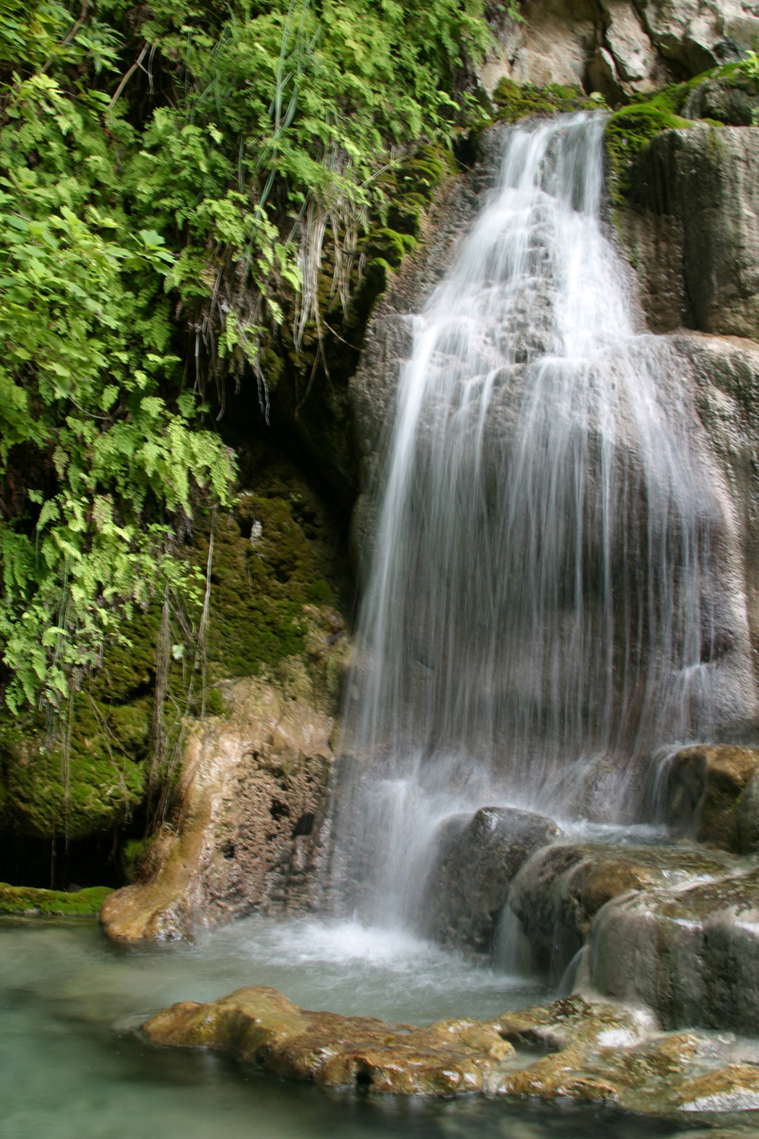 Tolantongo